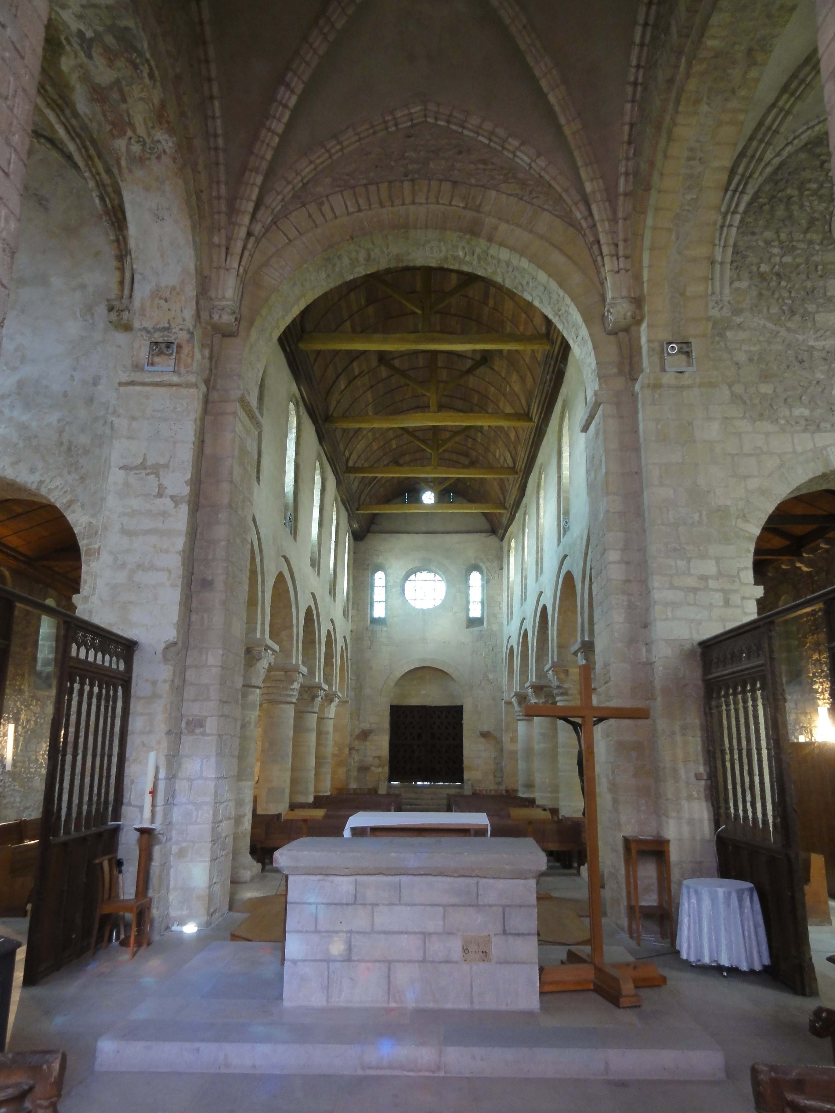 Intérieur de l'église (voir titre).